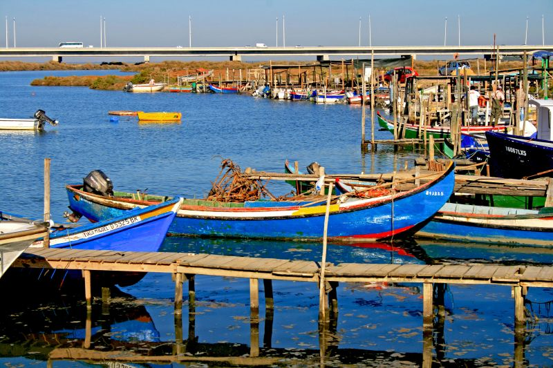 Até vais parar ao Samouco......